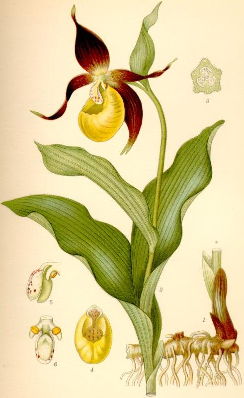 Cypripedium calceolus jordstammen och stjälkbasen, stjälk och blomma, fruktämnet i tvärsnitt (4/1), läppen, pelaren sedd från vänstra sidan, visande det rödprickiga staminodiet, det grönaktiga märket och den lilla gulaktiga ståndarknappen på vänstra sidan (2/1), pelaren, sedd från den sida, som vetter inåt läppen (2/1)